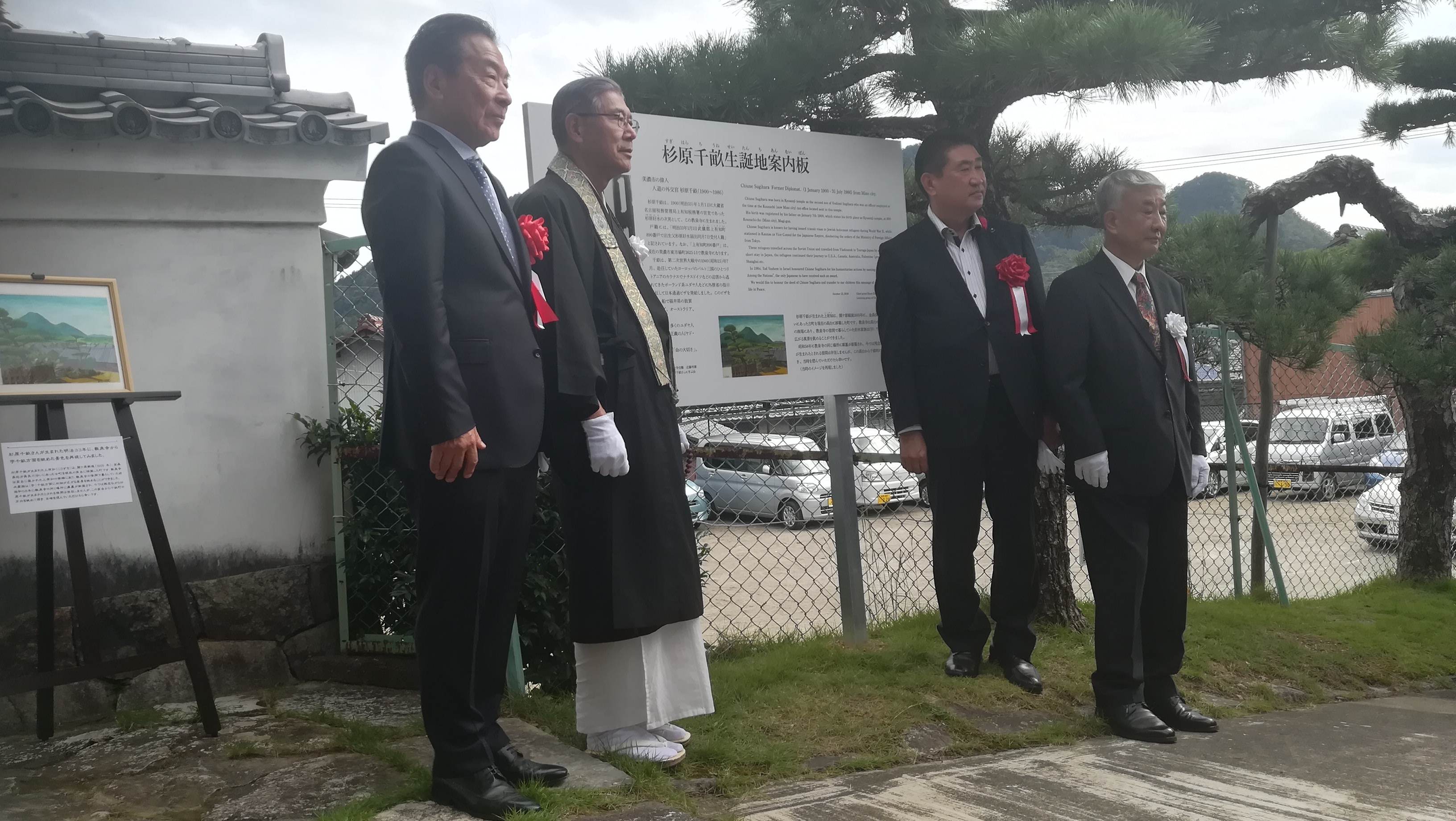 杉原千畝の出生地である美濃市教泉寺に設置された生誕地案内板の除幕式典